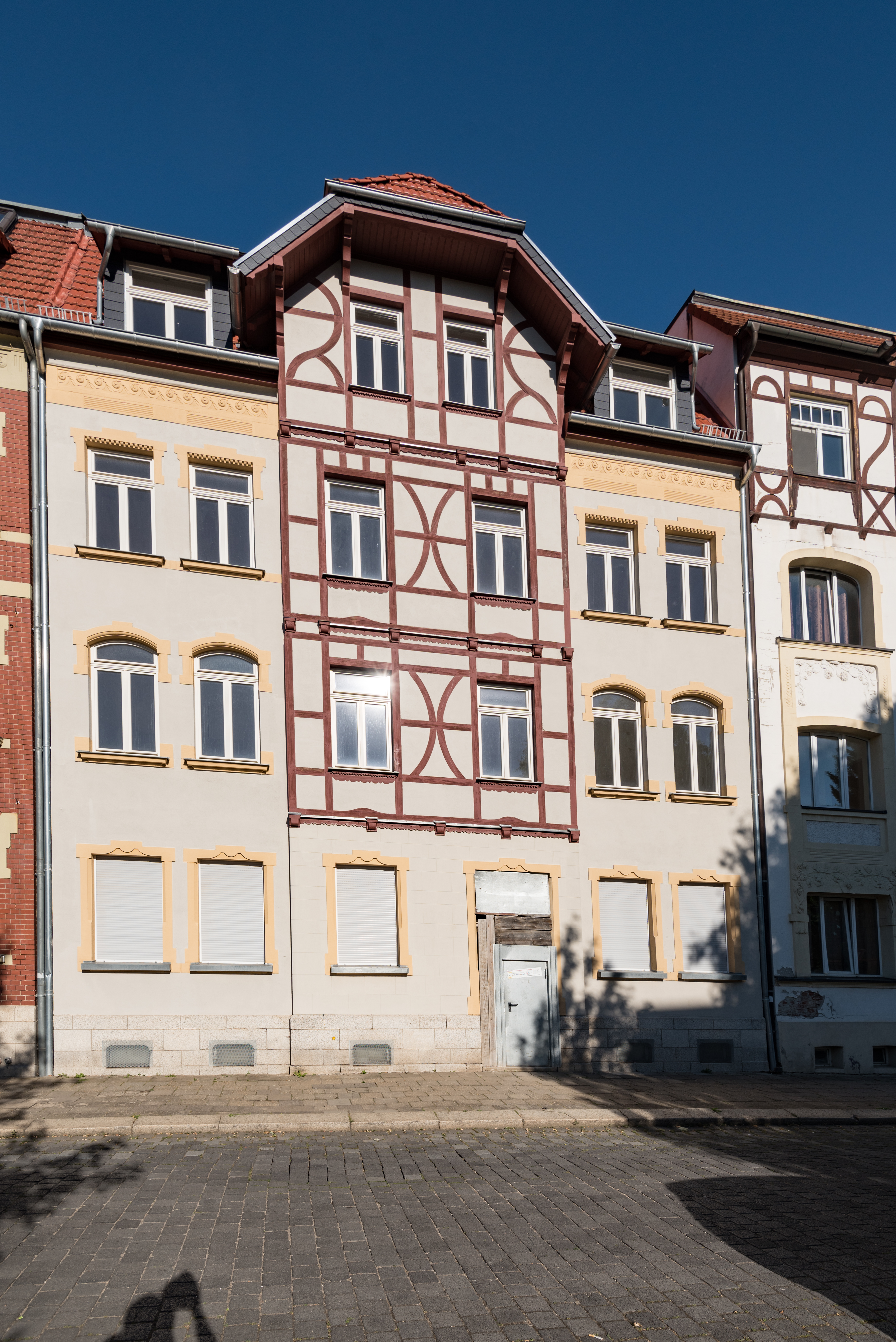 Weißenfels, Harnischstraße 1